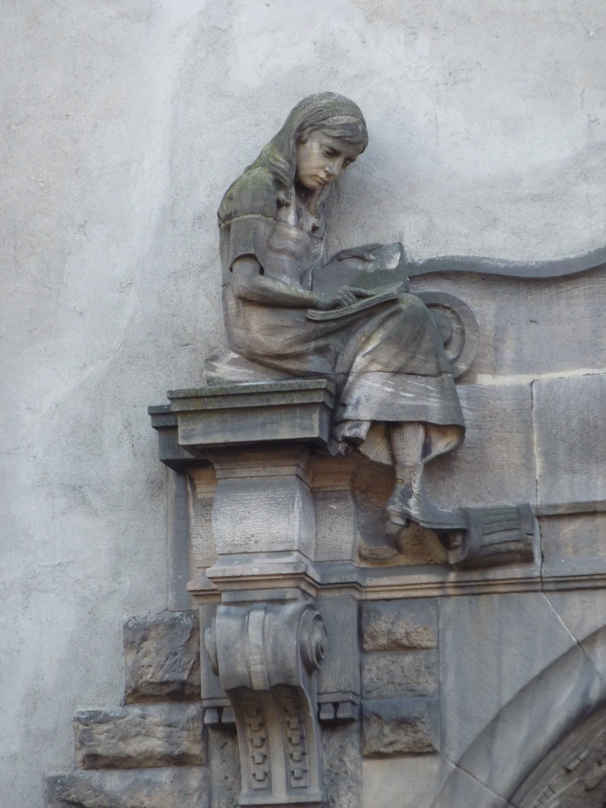 Eingangsschmuck am Mörikegymnasium, Esslingen